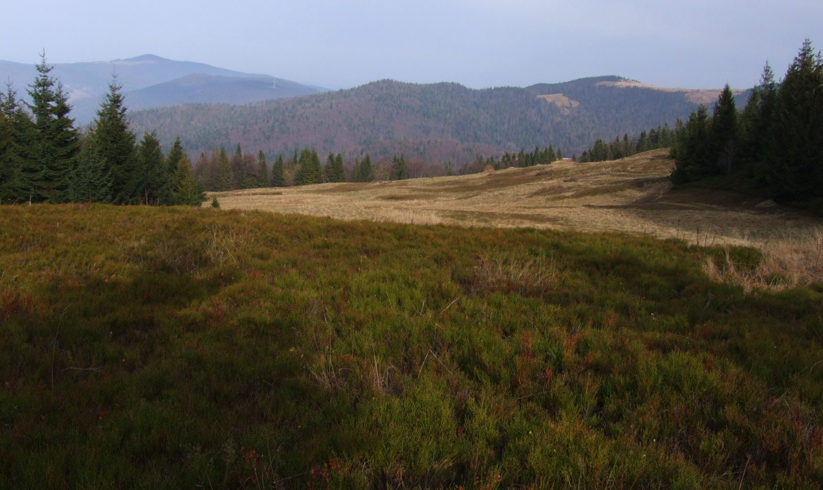 Polana Bieniowe w Gorcach